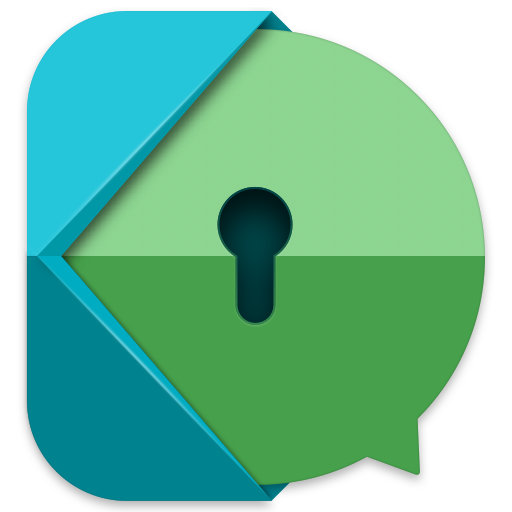 Logo von Kontalk